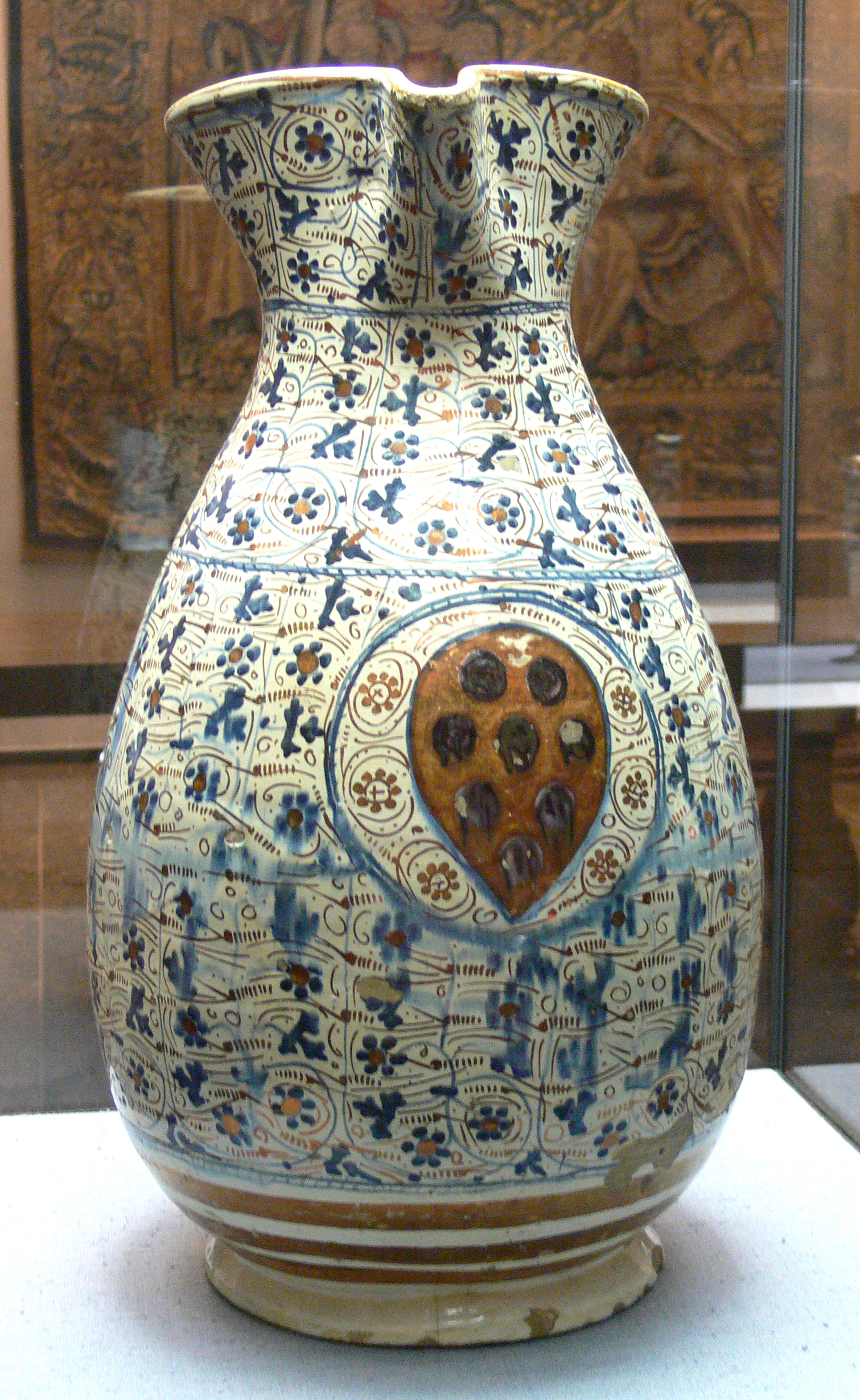 Majolika-Kanne mit Ranken in Blau und Goldlüster, in der Mitte das Wappen der Familie Medici; Valencia, um 1450-1460 Kunstgewerbemuseum Berlin, Inv. Nr. K 1692